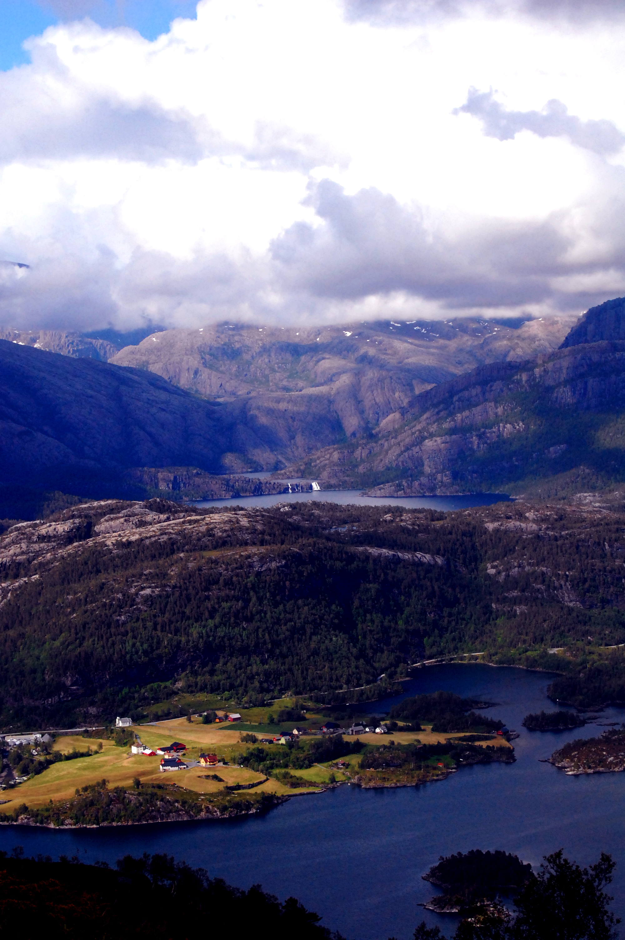 Norddalsfjorden